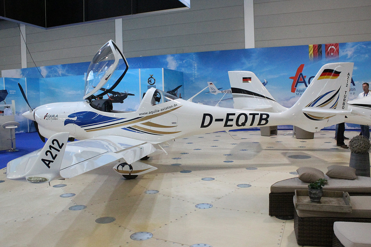 D-EQTB Aquila AT-01A-211T @ Friedrichshafen 10/04/2019